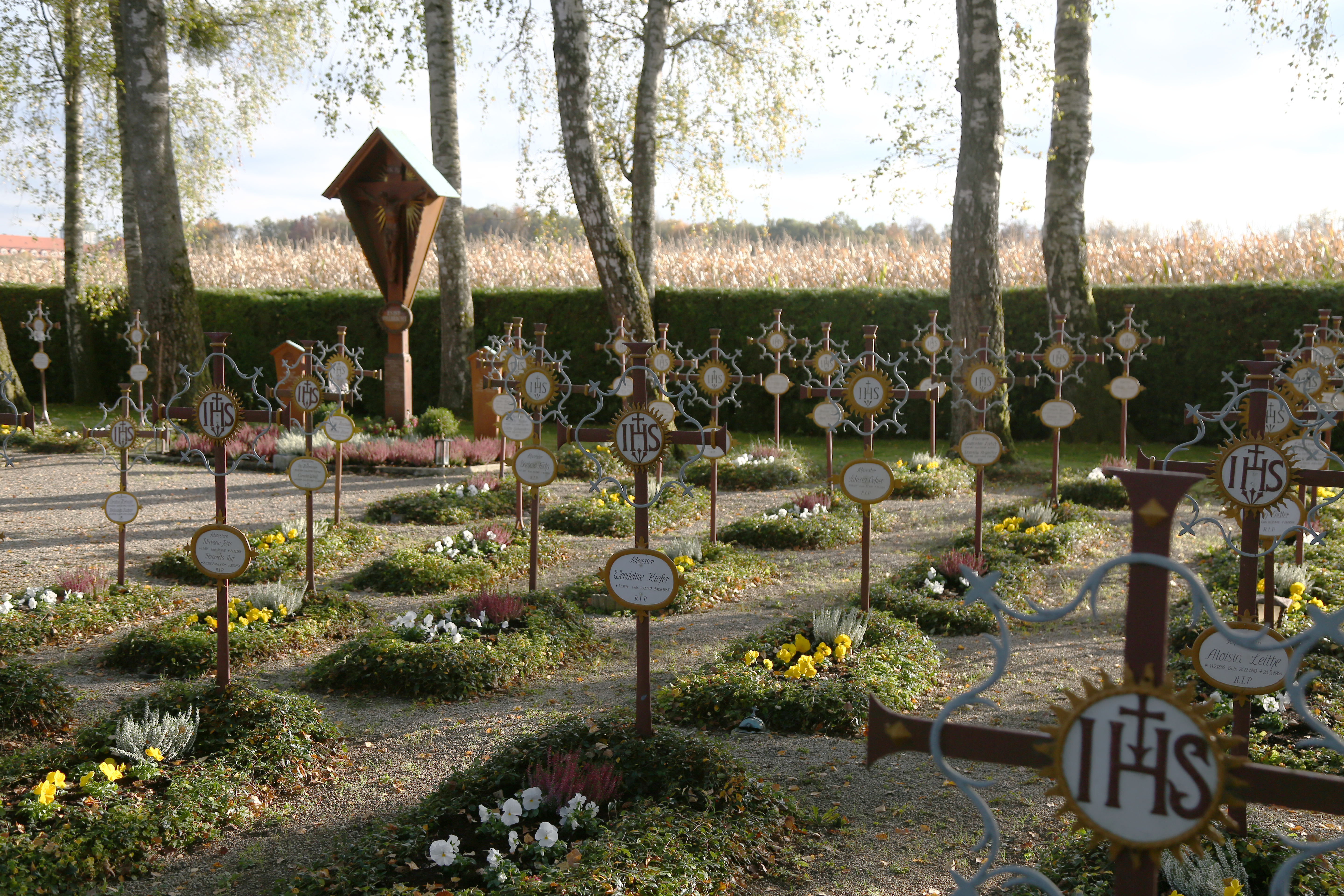 Gut Warnberg in München-Solln. Auf den Gelände eines historischen Gutes befinden sich die Marienanstalt Warnberg, die Privatschule Gut Warnberg, ein Reitstall und weitere Gebäude. Der Friedhof der Schwestern. Zugleich der südlichste Teil des Stadtgebiets München.